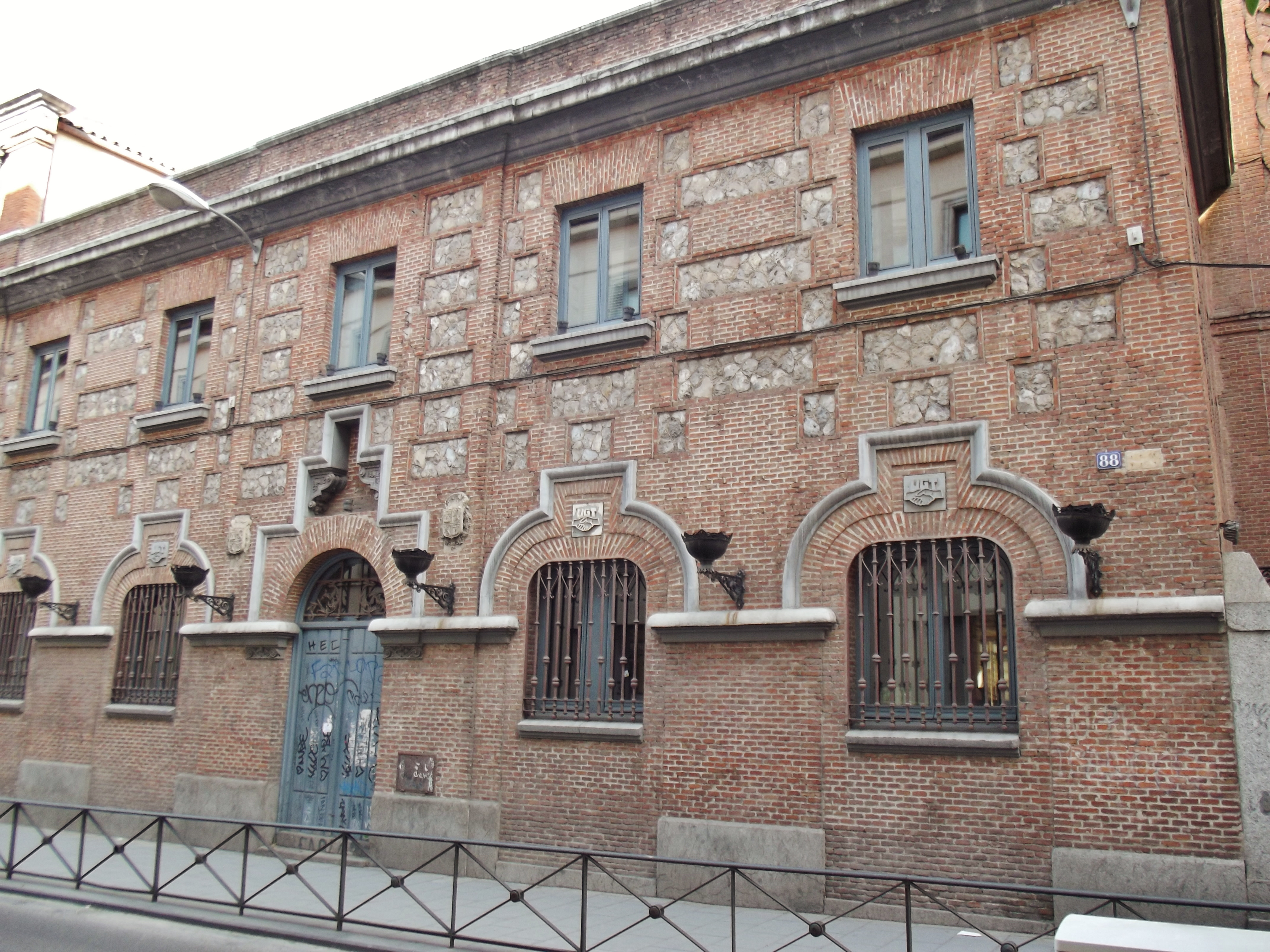 Sede confederal de UGT, calle Hortaleza 88, Madrid